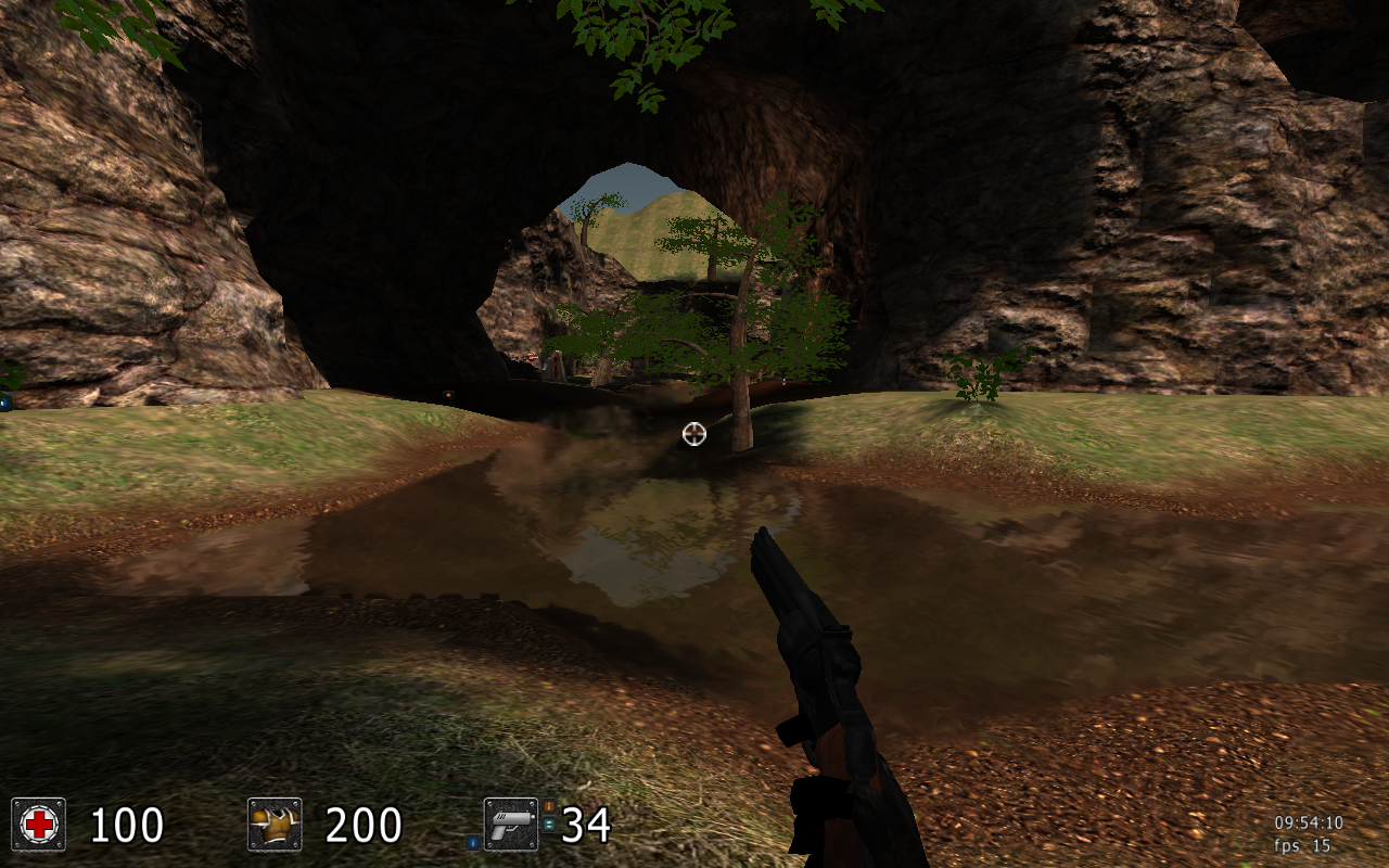 Скриншот игры Sauerbraten